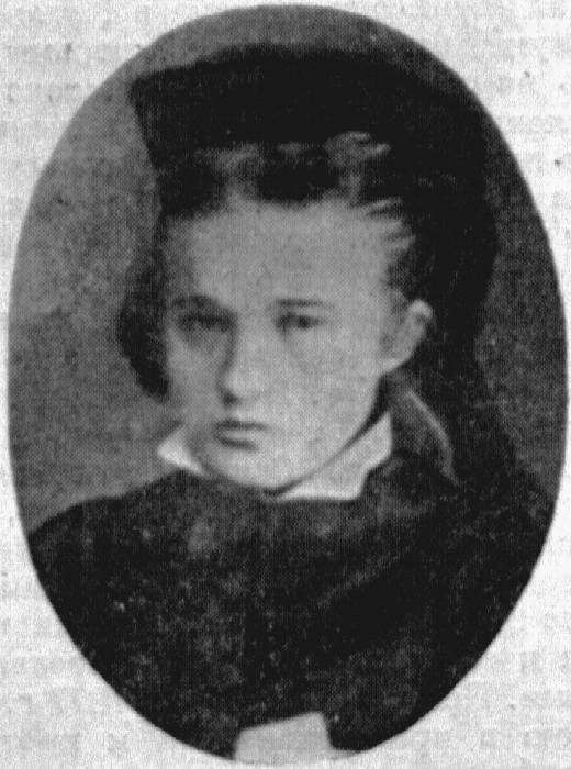 Субботина Надежда Дмитриевна - русская революционерка, народница.